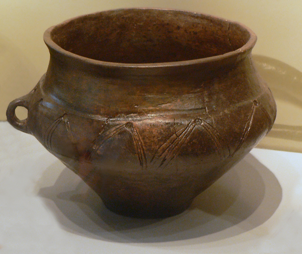 Nienburger Tasse, gefunden in Mehlbergen, ausgestellt im Museum Nienburg, Fotoveröffentlichung in Wikimedia Commons mit Genehmigung des Museums vom 05.11.2012